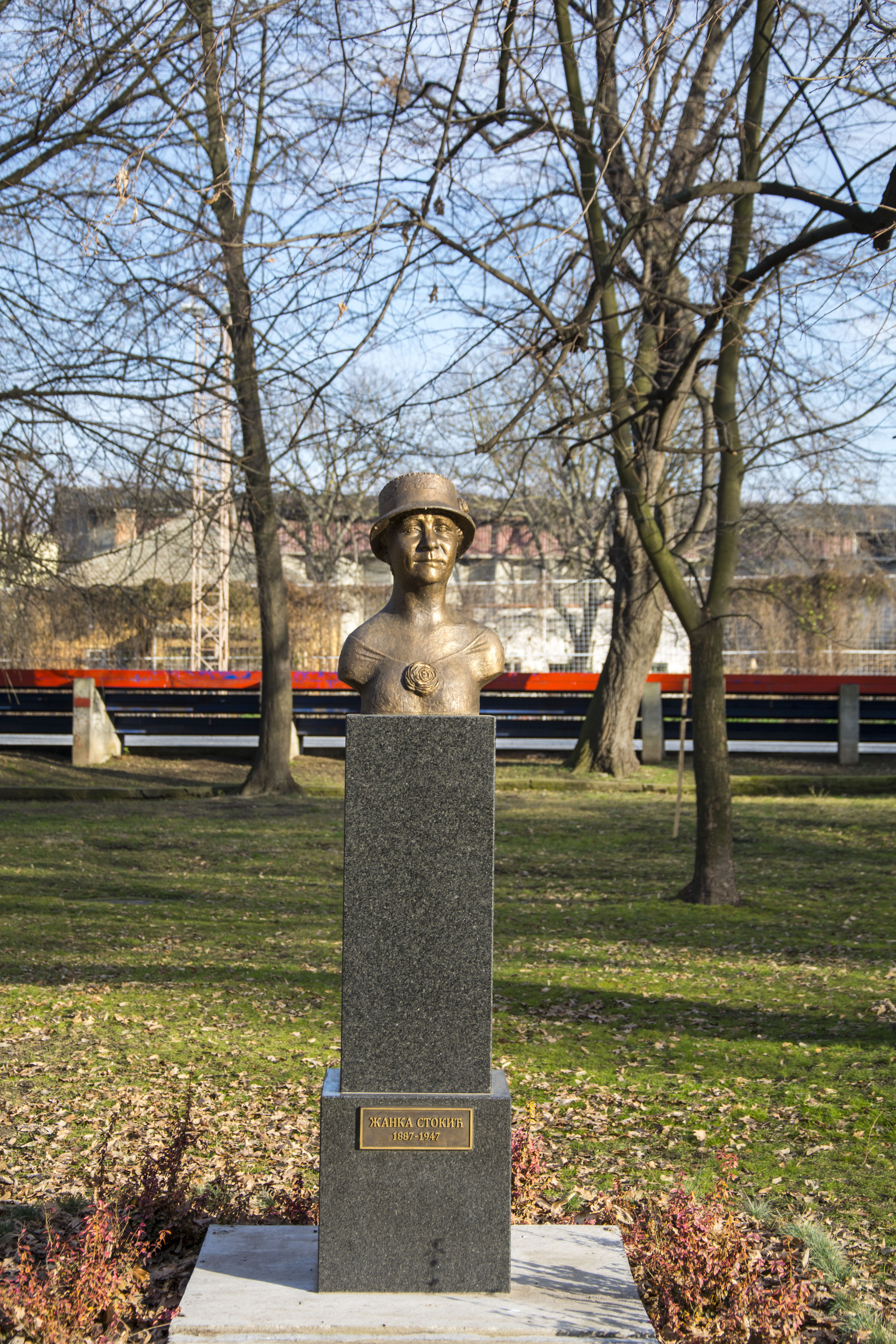 Велико Градиште споменик